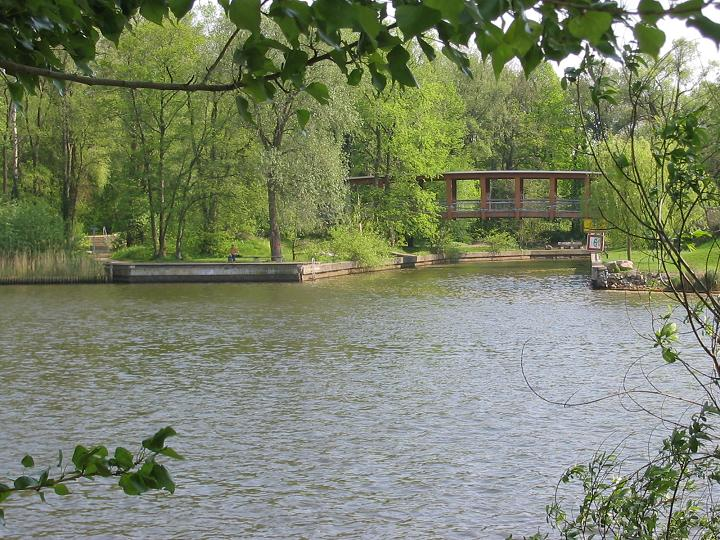 Mündung der Nuthe in die „Neue Fahrt“, einen Havelarm in Potsdam gegenüber der Freundschaftsinsel.